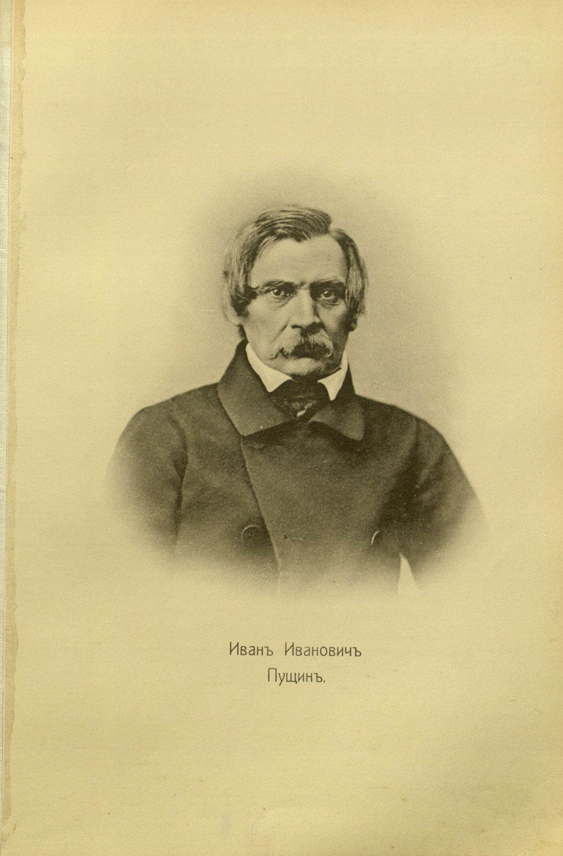 Ivan Puschin